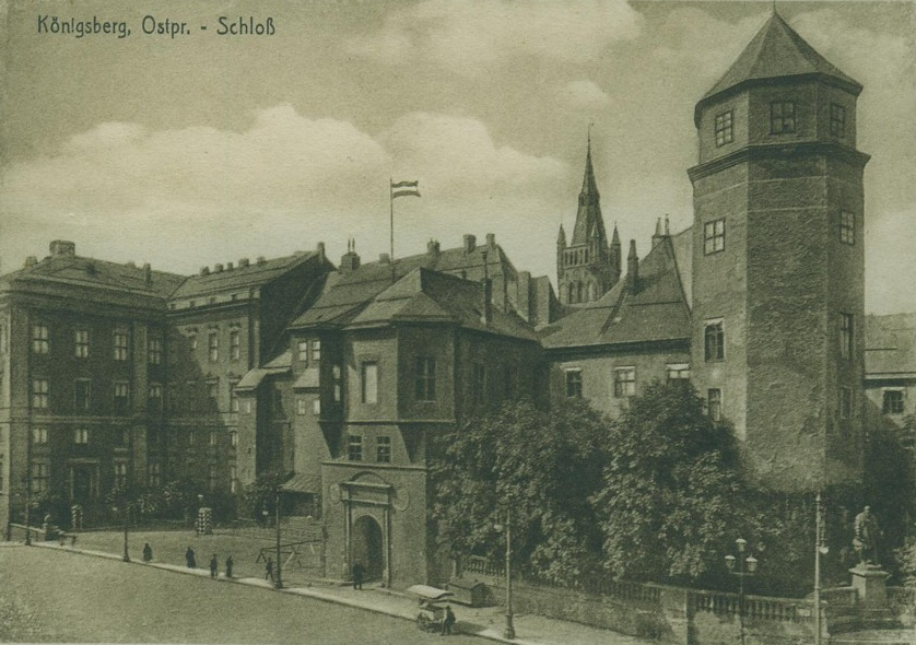 Königsberger Schloss vom Münzplatz - der Haberturm